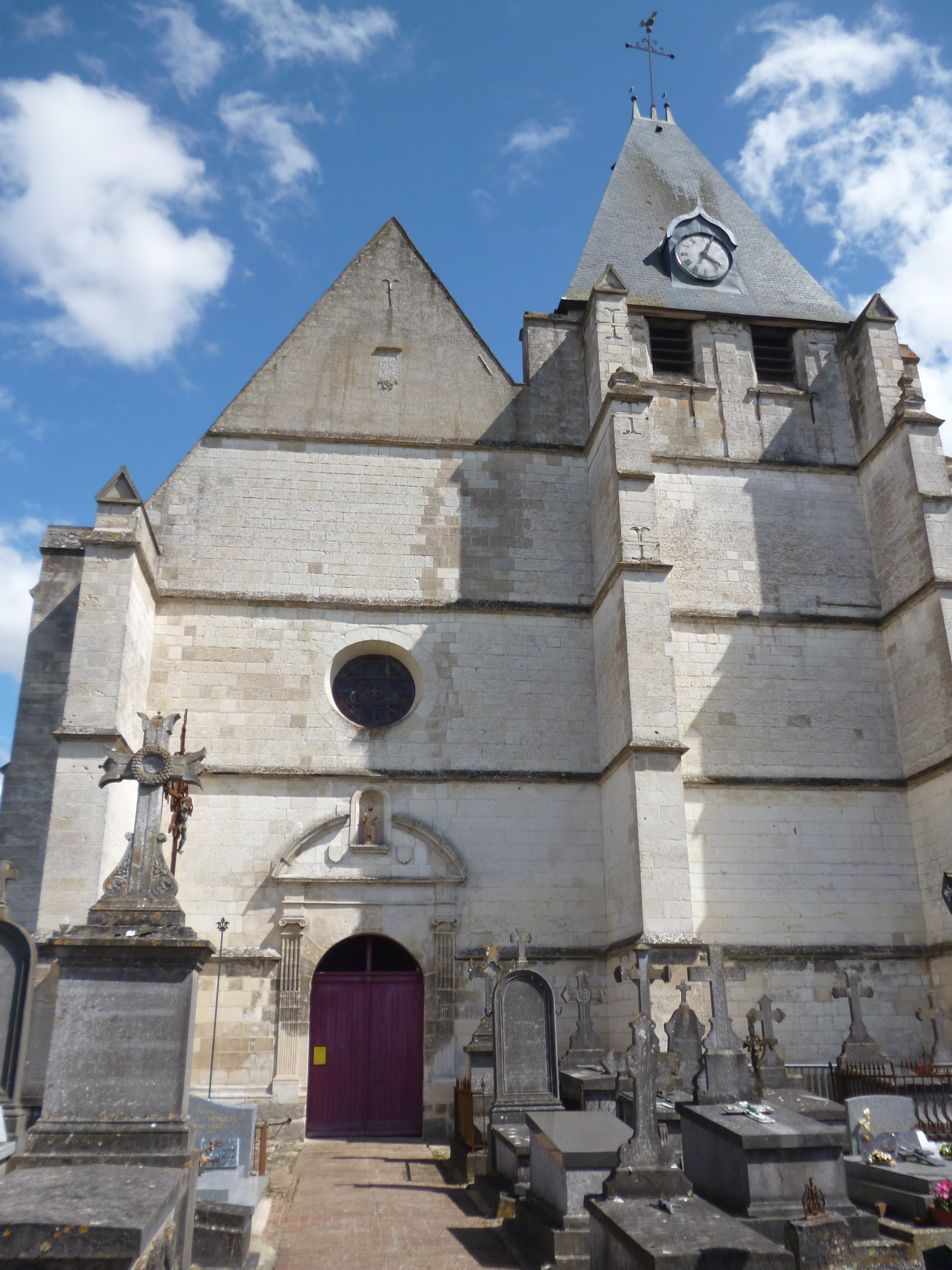 Eglise Saint-Léger et cimetière de la commune de Chepoix (Oise).